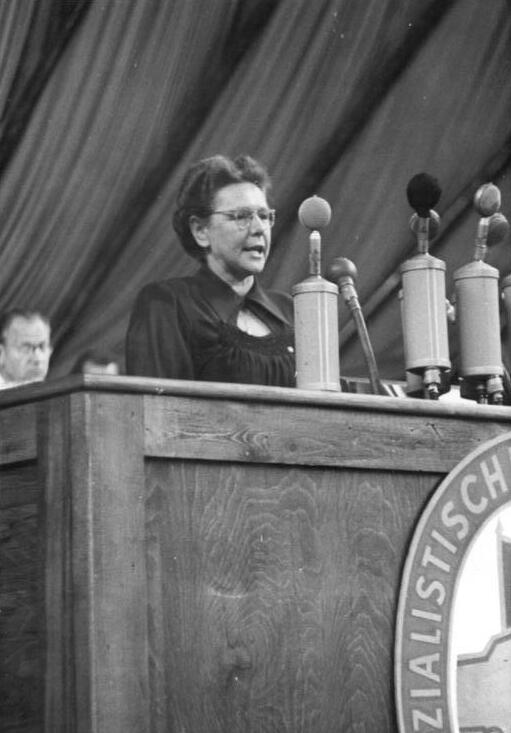 III.Parteitag der SED vom 20.-22.7.1950. Vom 20.-22.7.1950 findet in Berlin in der Werner-Seelenbinderhalle der III.Parteitag der Sozialistischen Einheitspartei Deutschlands statt. Friedel Malter bei ihrer Diskussionsrede Aufn. Illus-Quaschinsky 7294-50 84 Mlk 22.7.50